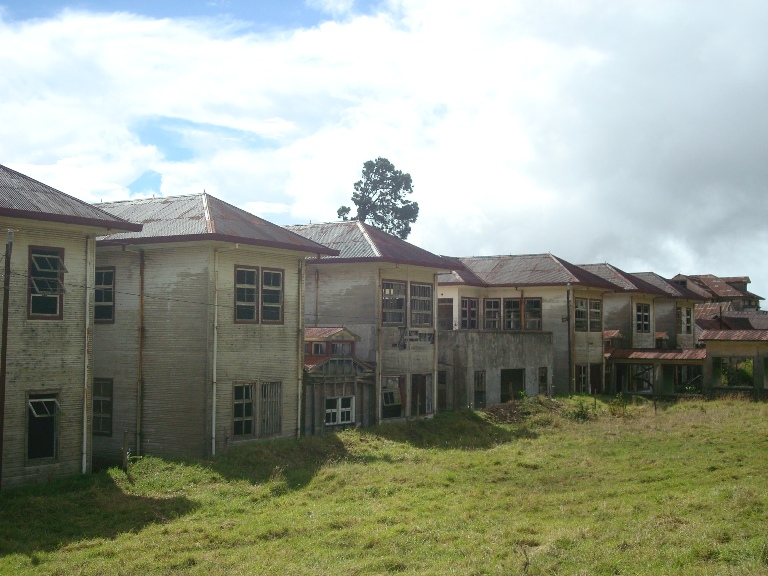 El Sanatorio Durán, en la Prusia de Cartago, visto desde los patios interiores.